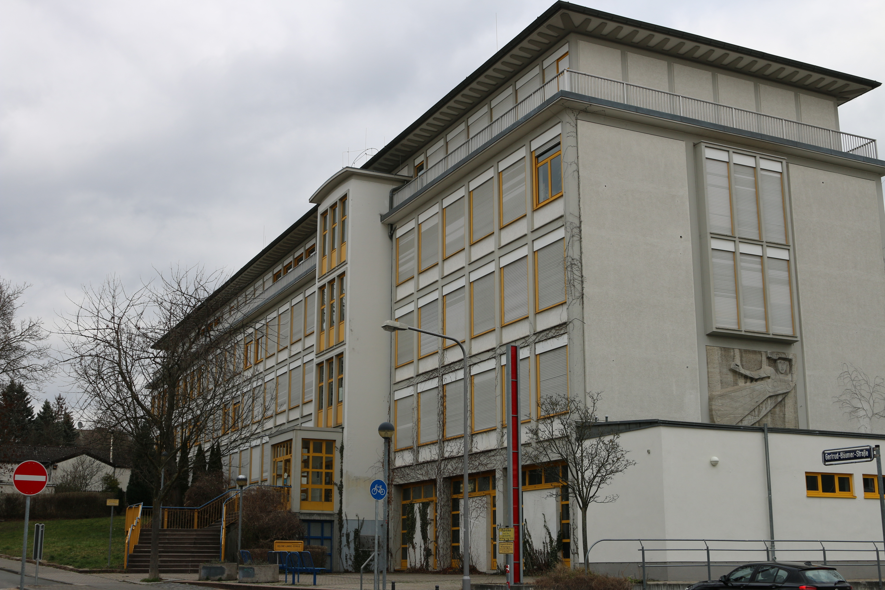 Wiesbaden: Helene-Lange-Schule